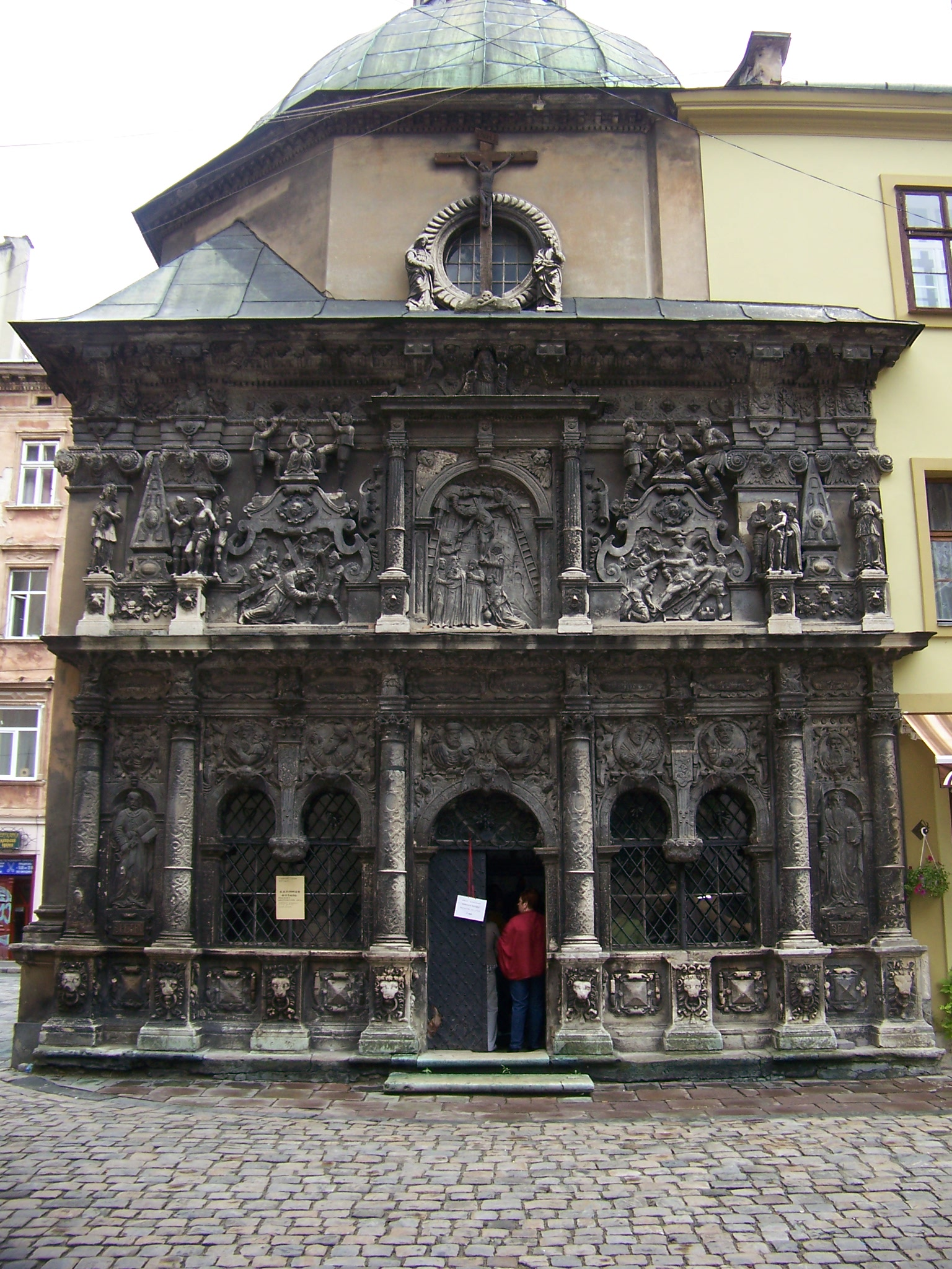 Kaplica Boimów, Lwów, Ukraina